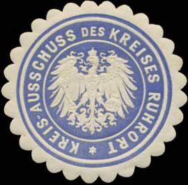 Sealing stamp Title: Kreis-Ausschuss des Kreises Ruhrort Description: blau, weiß, geprägt Place: Ruhrort size: 4 cm